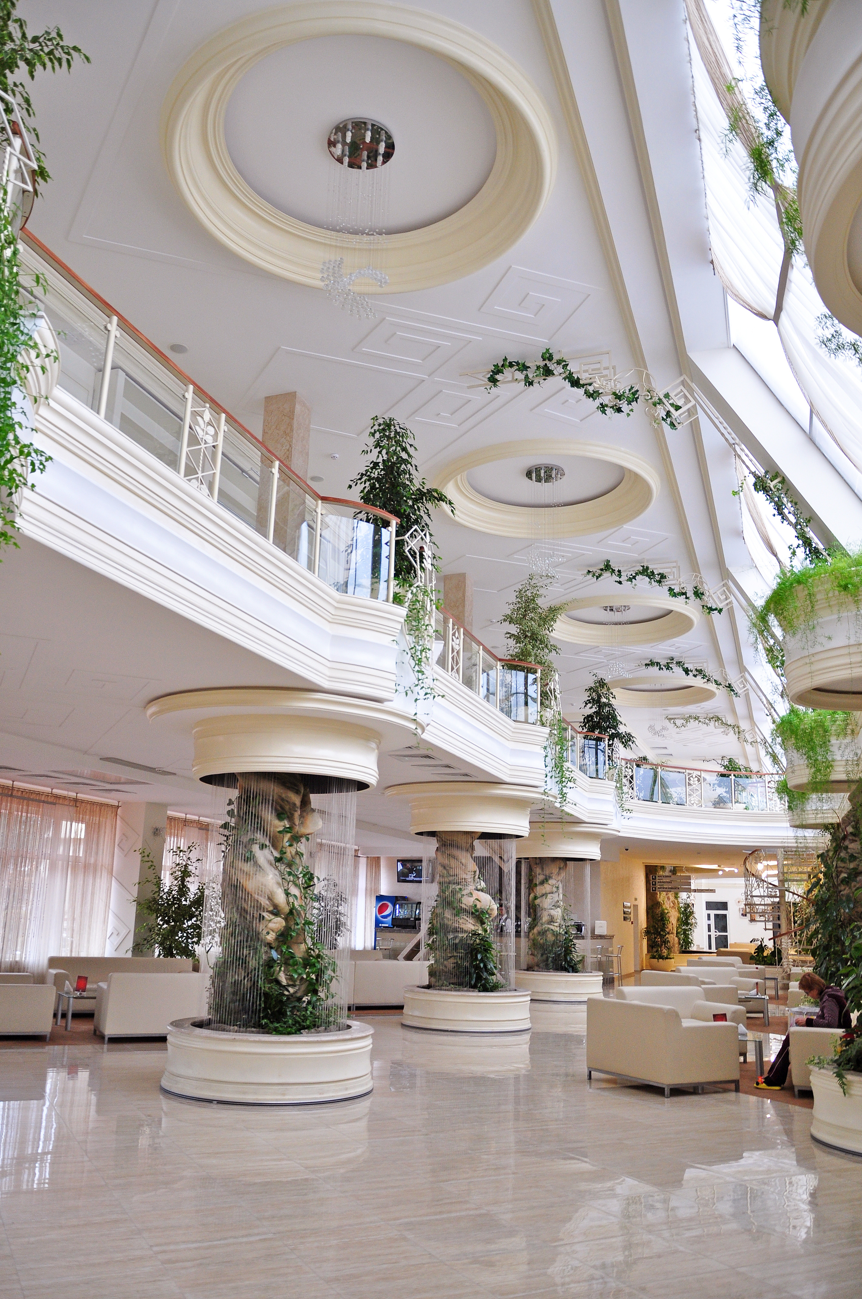 Санаторій Карпати у Трускавці - центральний хол, рецепція та интер'єр курортного комплексу